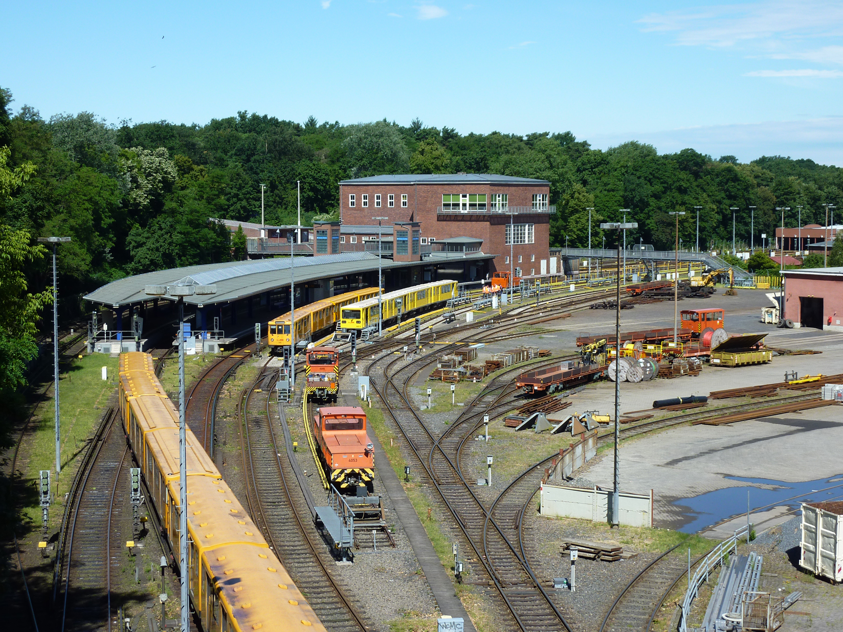 U-Bahnhof Olympiastadion mit einem Teil des Betriebsgeländes